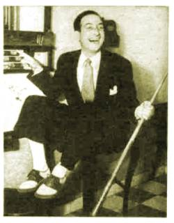 Fotografía de Fidel Pintos